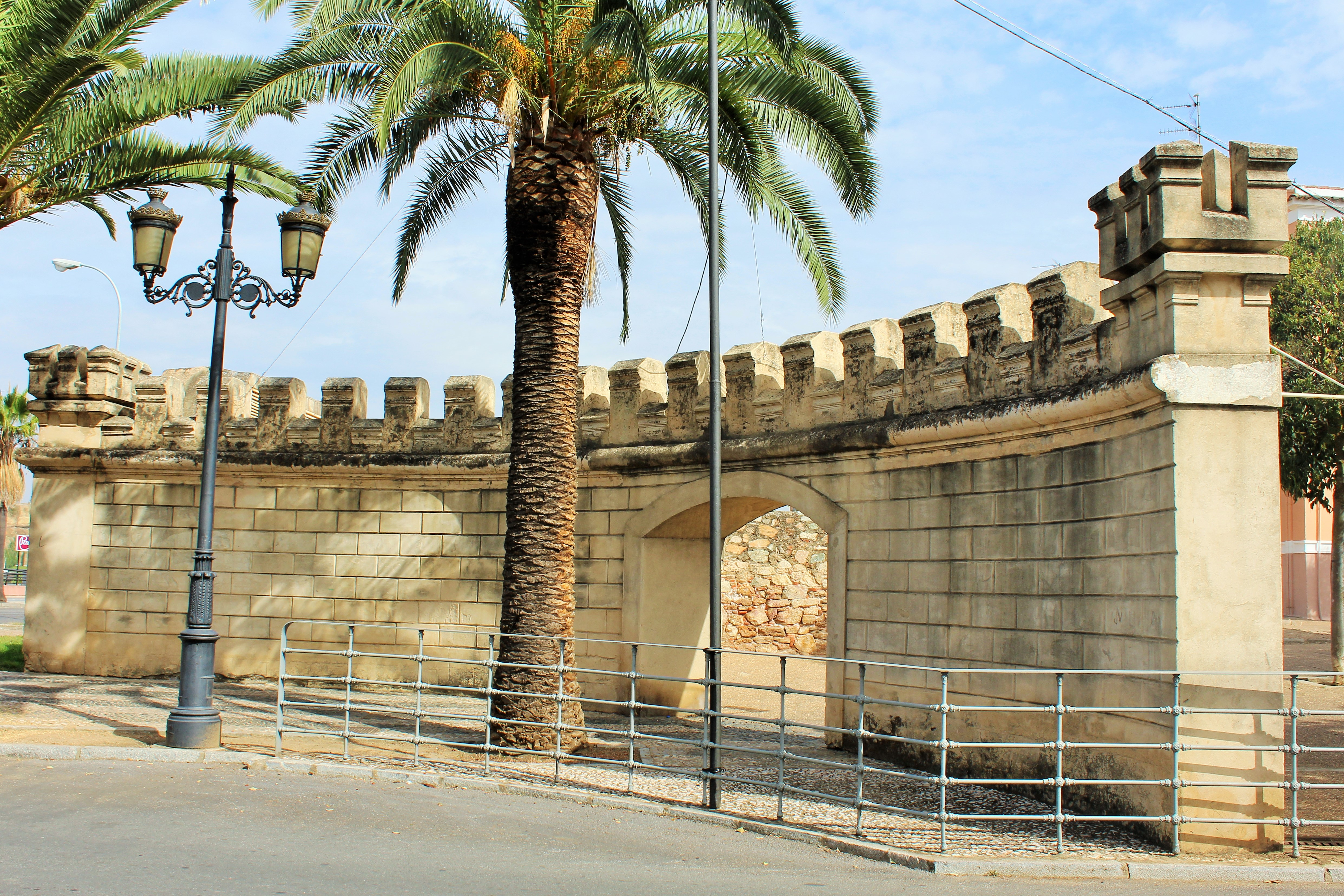 Lienzo en curva con puerta y almenado junto a Puerta de Palmas.